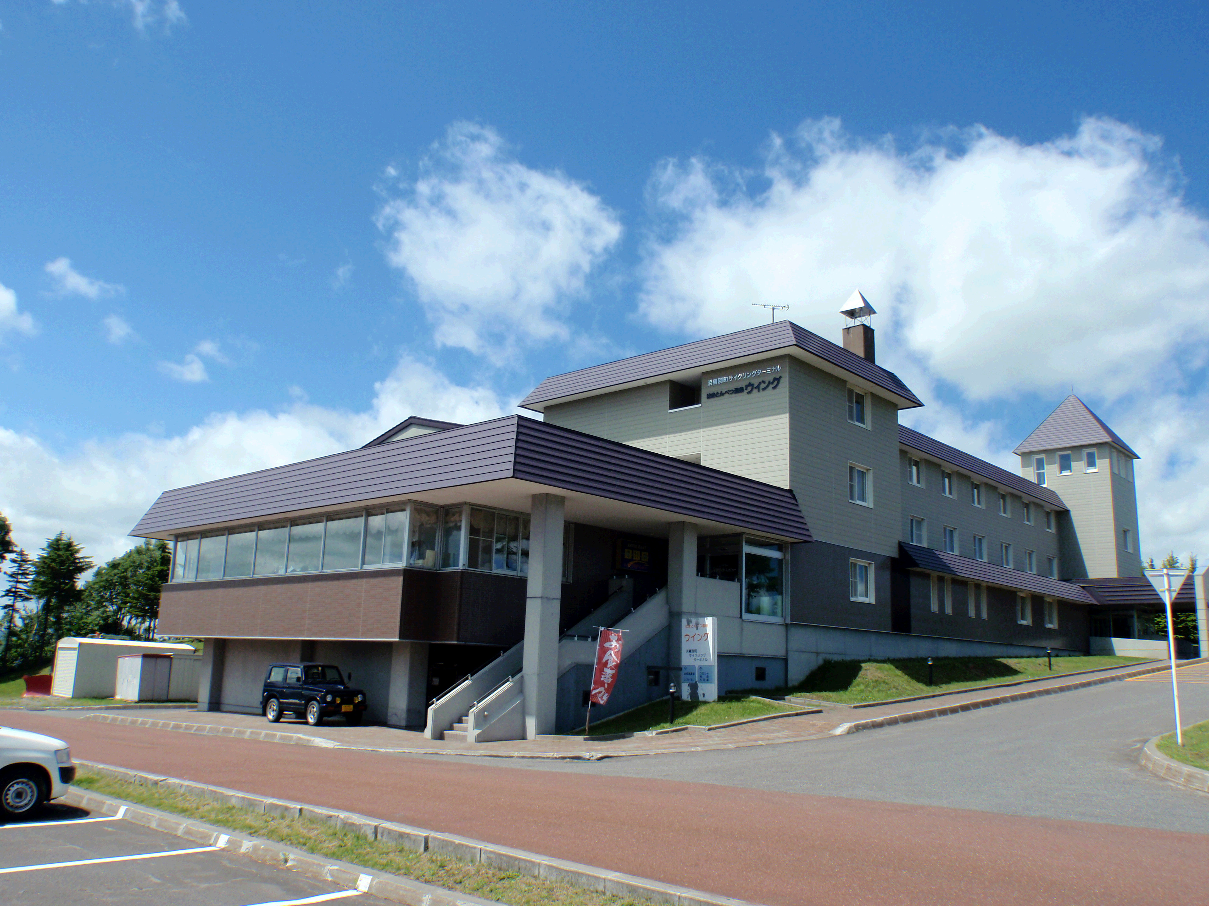 はまとんべつ温泉 ウィング